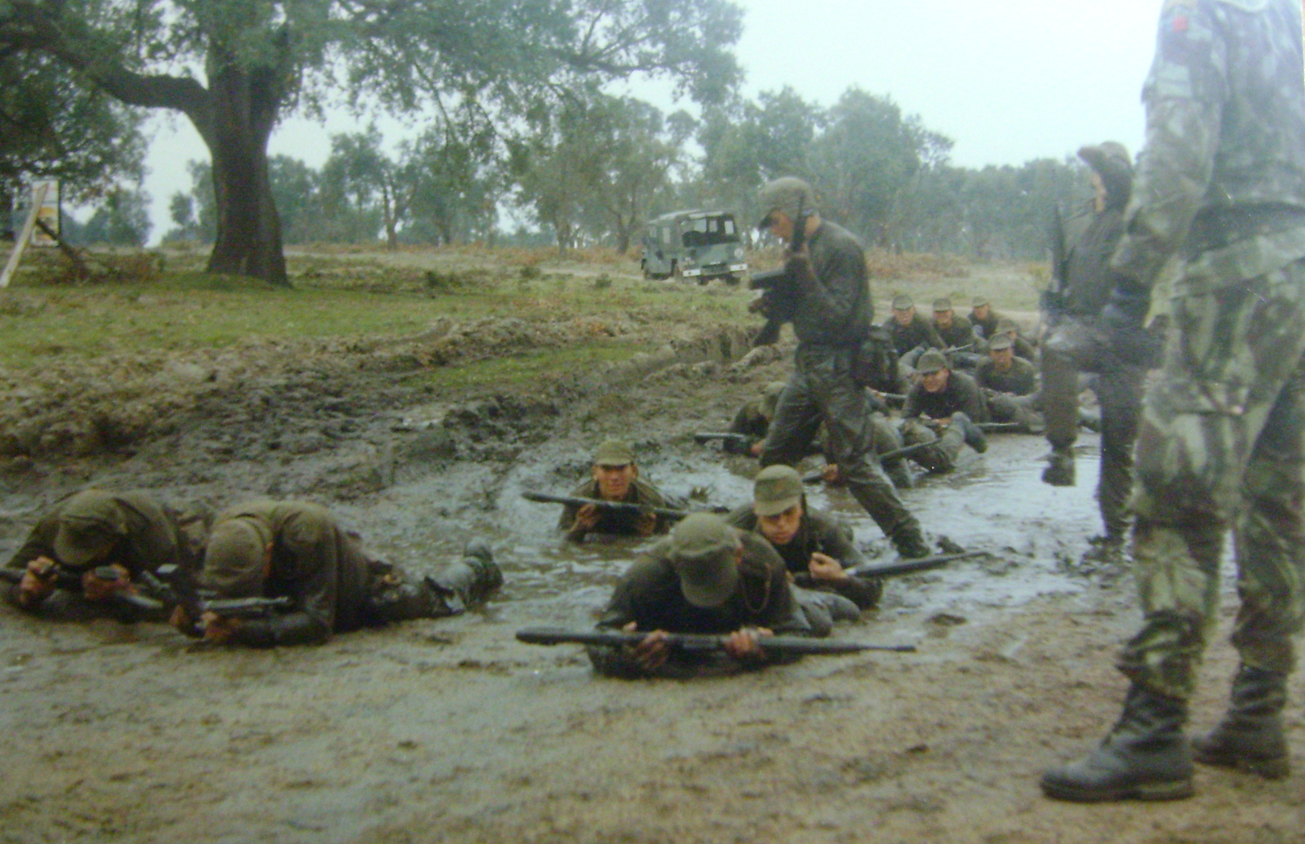 Imagens da prova de choque do 85º curso de Comandos (1º turno de 1986)